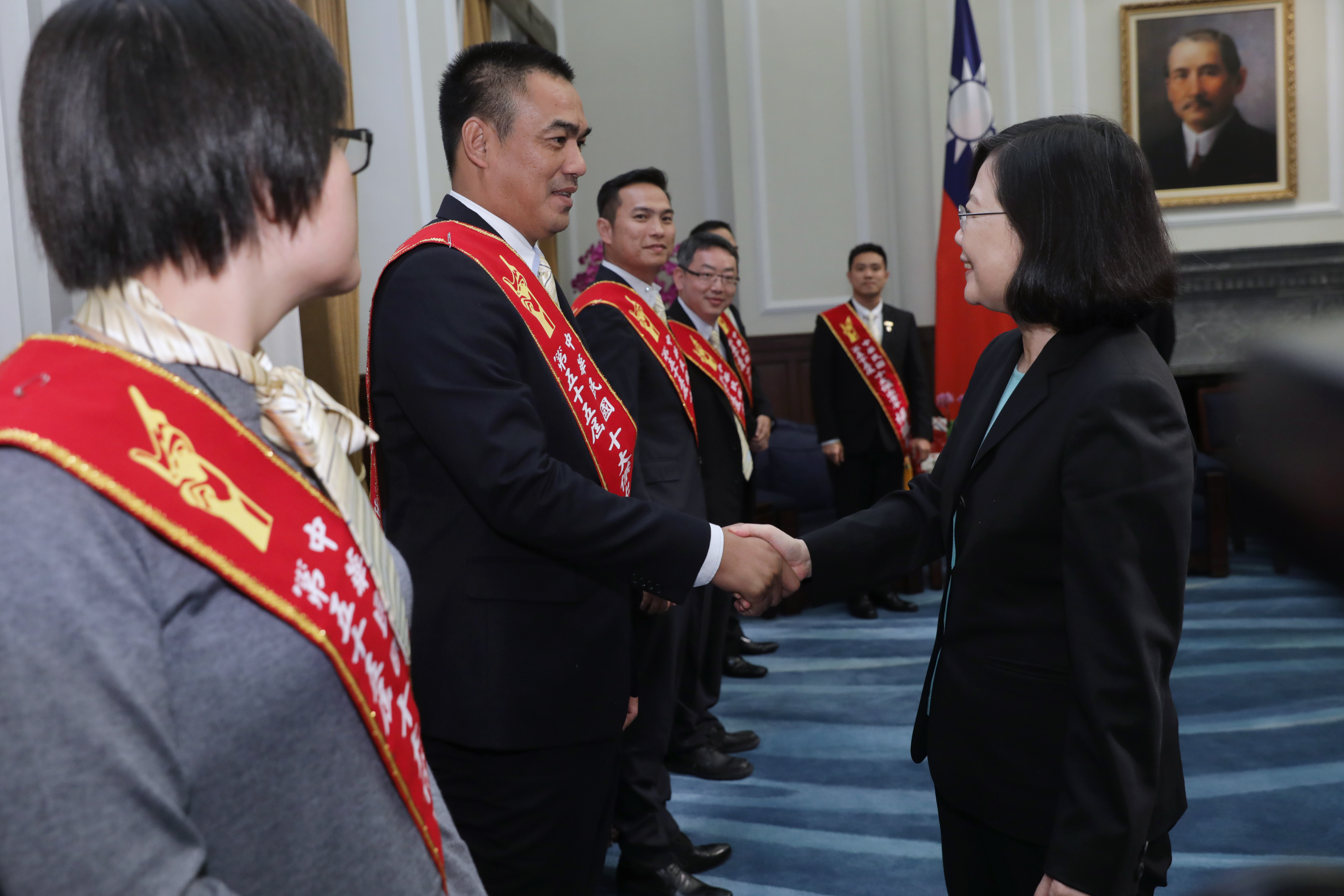 蔡英文總統今（13）日下午接見「第55屆十大傑出青年當選人」，除肯定他們讓各界看到臺灣轉型與進步的卓越貢獻，並期勉當選人和社會大眾都能回歸初心，奉獻社會，擁抱世界